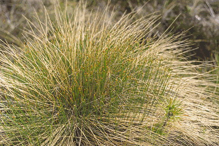 Kupstinė kūlingė (Trichophorum cespitosum) Šeima. Viksvuoliniai (Cyperaceae) Foto: Algirdas. Fotografuota Dautarų miško aukštapelkėje, Mažeikių raj.